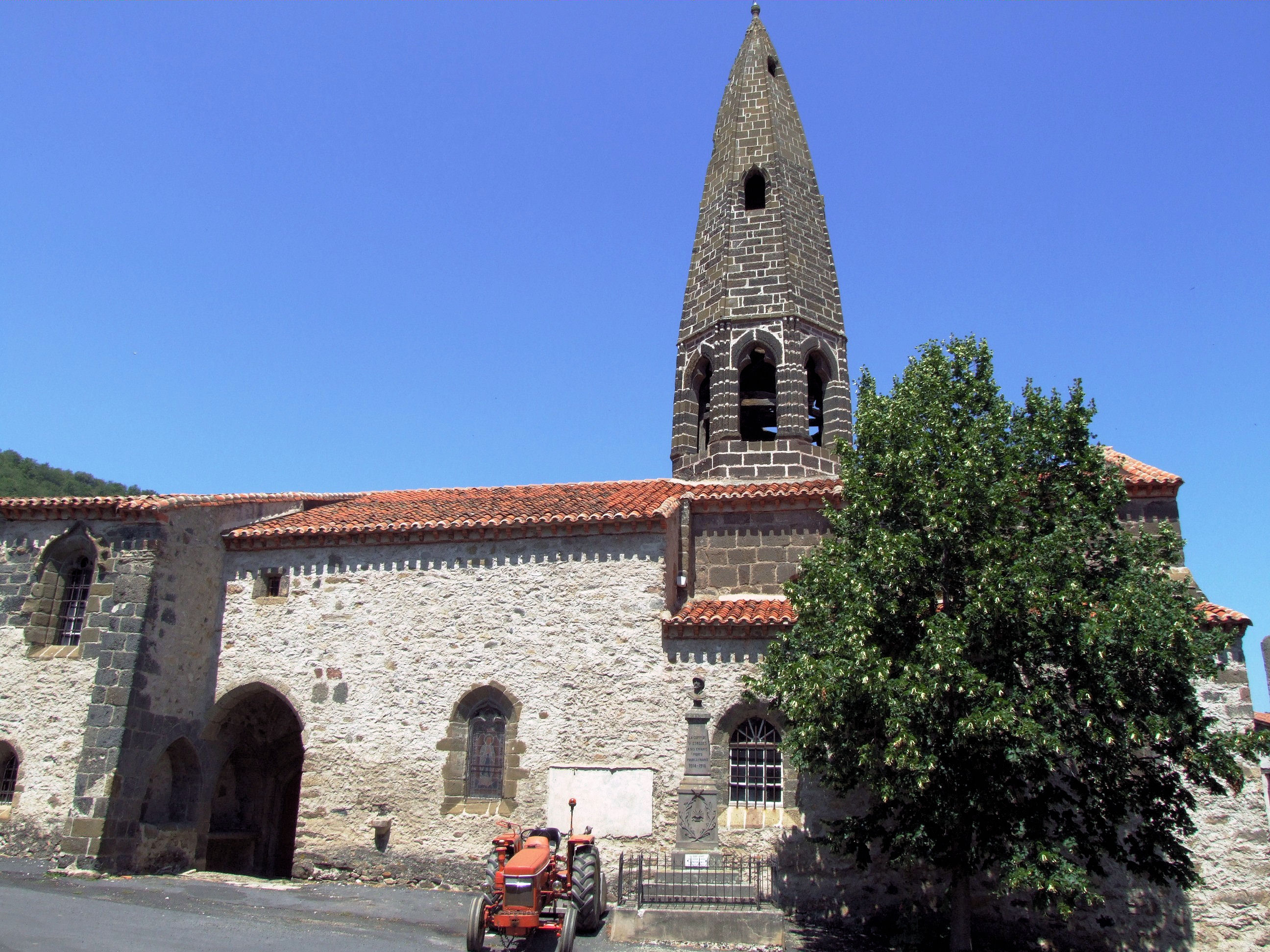 Eglise Saint-Cirgues -1